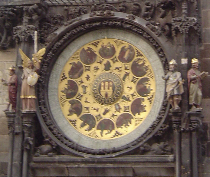 DescriÃ§Ã£o: Pintura e estÃ¡tuas que ornamentam o RelÃ³gio AstronÃ´mico Orloj, em Praga Fonte/CrÃ©ditos: Arquivo pessoal de JoÃ£o Daniel Piccino. LicenÃ§a